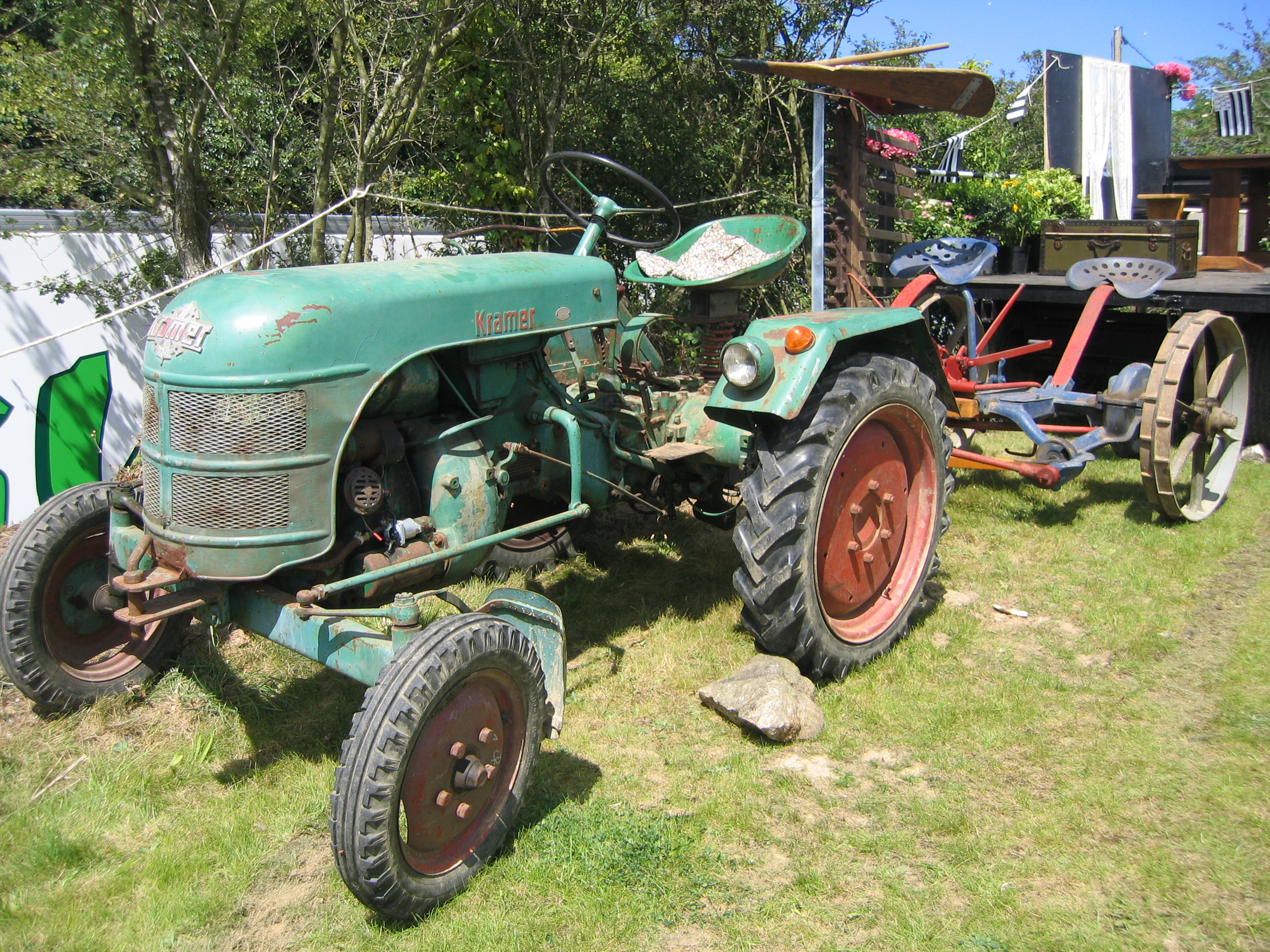 Tracteur Kramer, modèle à déterminer, Plougoulm gouel an eost 2007